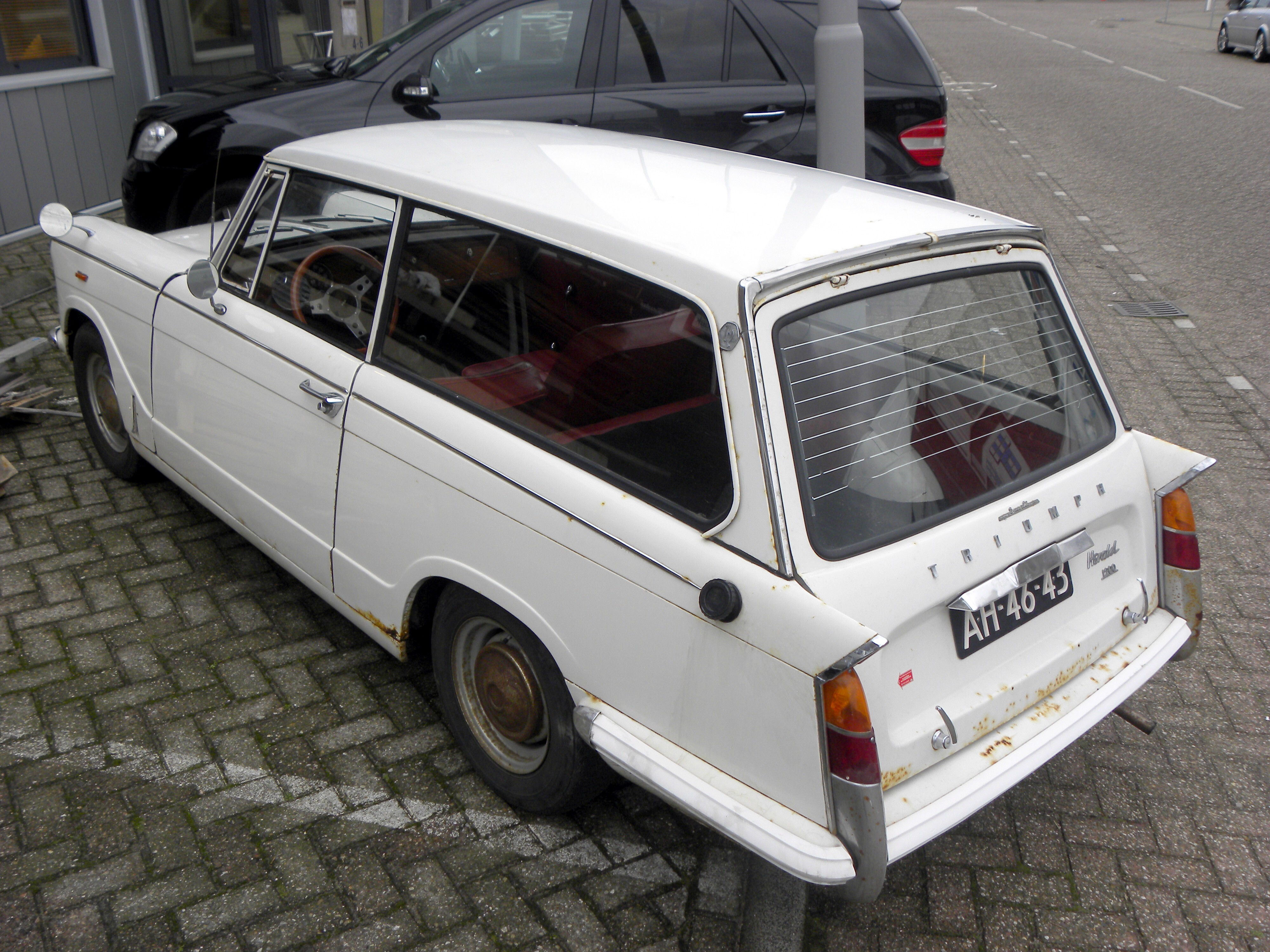 Triumph Herald 1200 Estate car